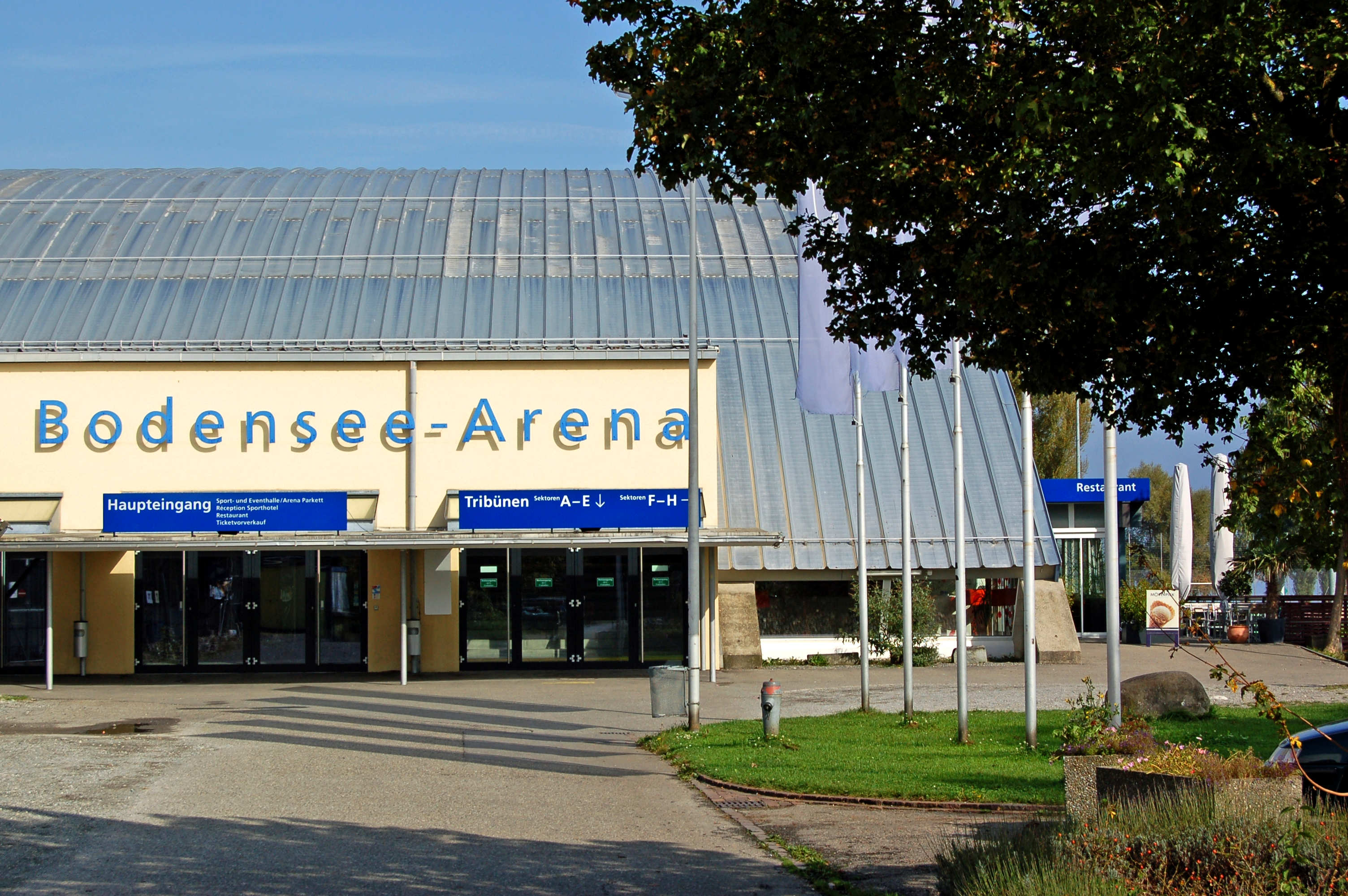 In der 1997 eröffneten Bodensee-Arena trägt der HC Thurgau, ein noch junger Schweizer Eishockey-Club, seine Heimspiele aus. Die Arena fasst bis zu 6000 Zuschauer.